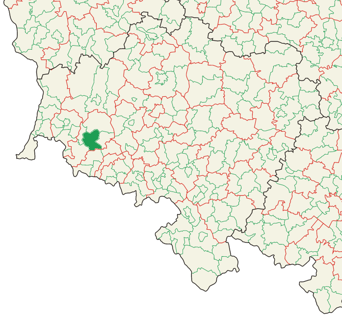 Mapa administracyjna Polski z zaznaczonymi granicami województw (na czarno), powiatów (na czerwono) i gmin (na zielono), południowo zachodni wycinek, województwo dolnośląskie, wycinek z zaznaczeniem gminy Lubomierz. Stan na 1 stycznia 2008